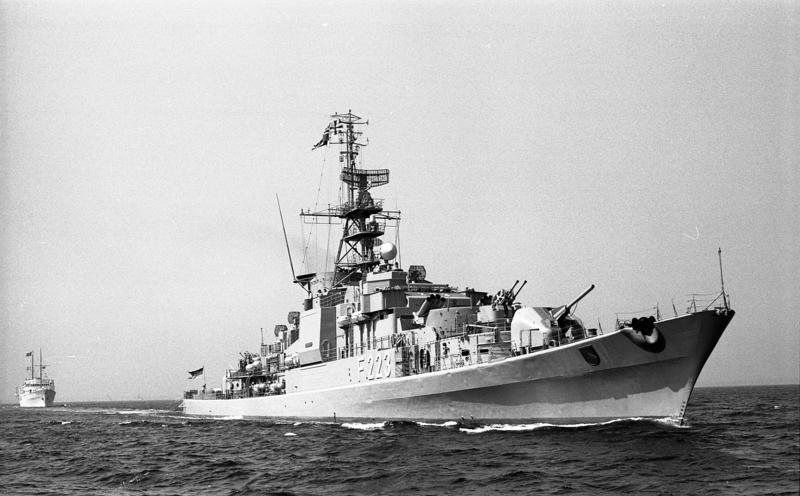 Staatsbesuch König Olav V. von Norwegen in Kiel. Verabschiedung und Abfahrt mit der Yacht "Norge" in Begleitung von Zerstörern der Bundesmarine 4.-8.6.1973